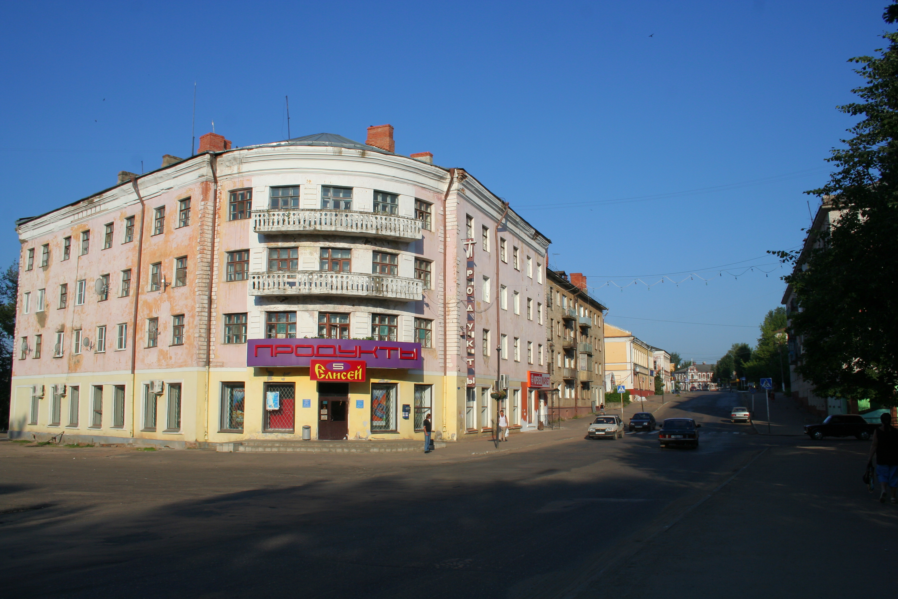 Im Zentrum von Bologoje (Oblast Twer, Russland). Architektur der Stadt am Beispiel der Kirow-Straße.